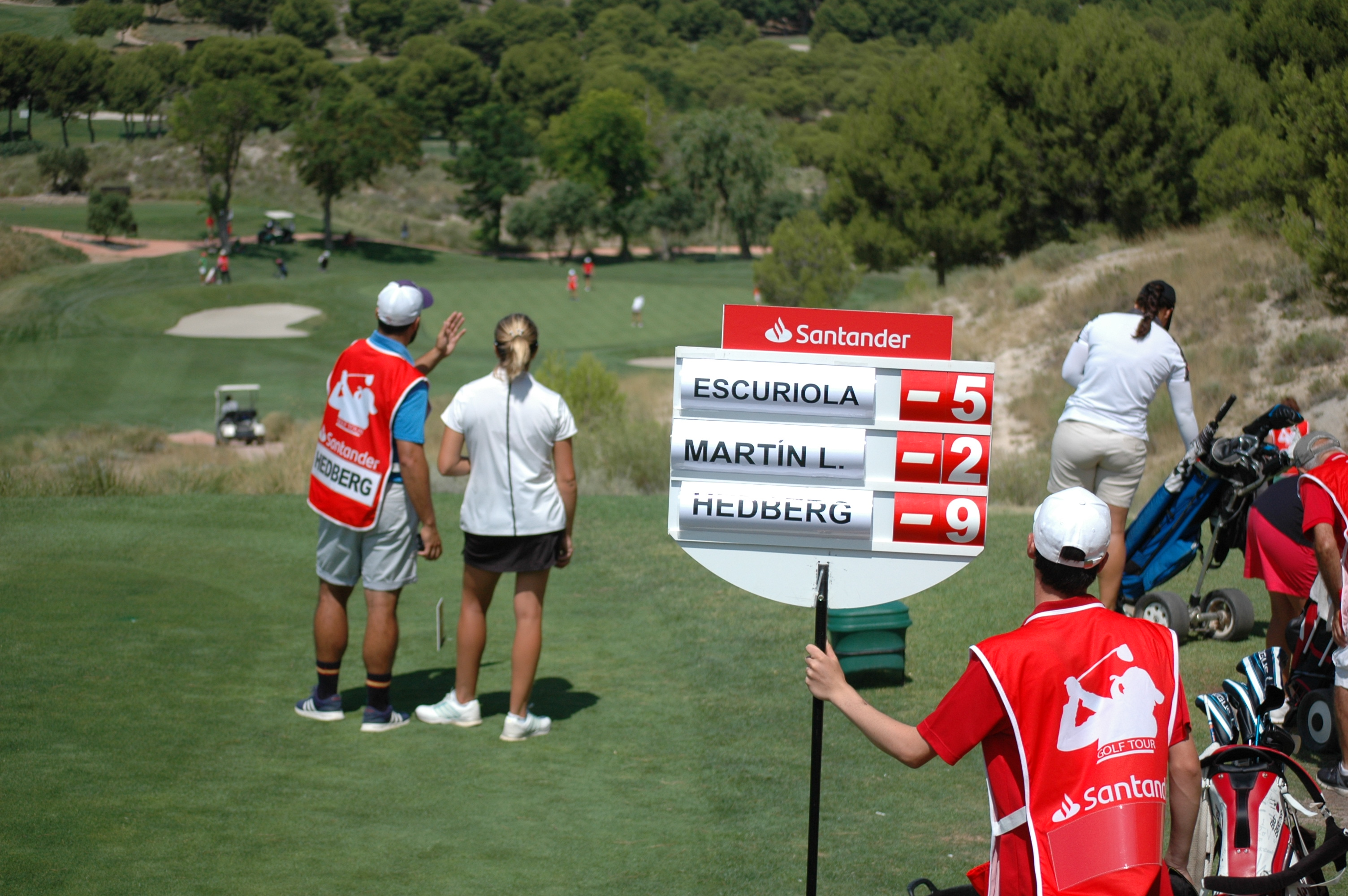 Leaderboard y jugadoras en un torneo del Santander Golf Tour.